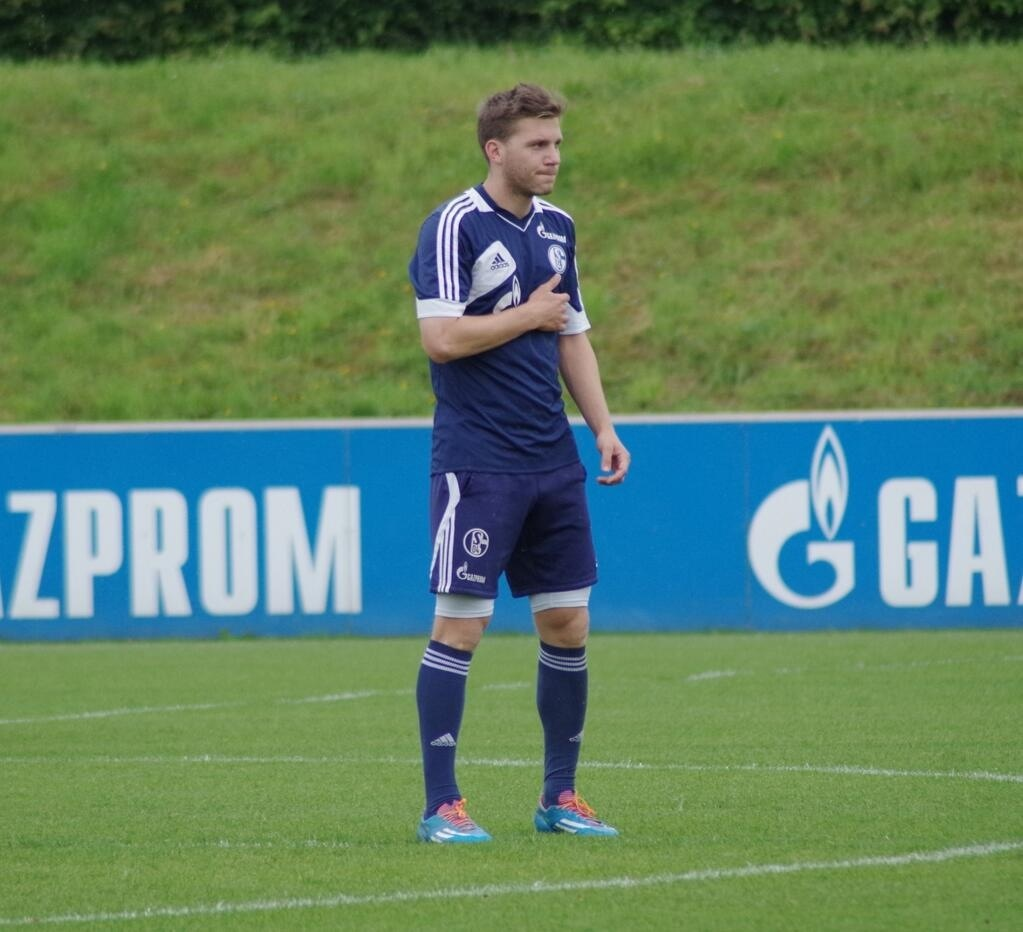 Robert Leipertz (Bild:Volker Barth)